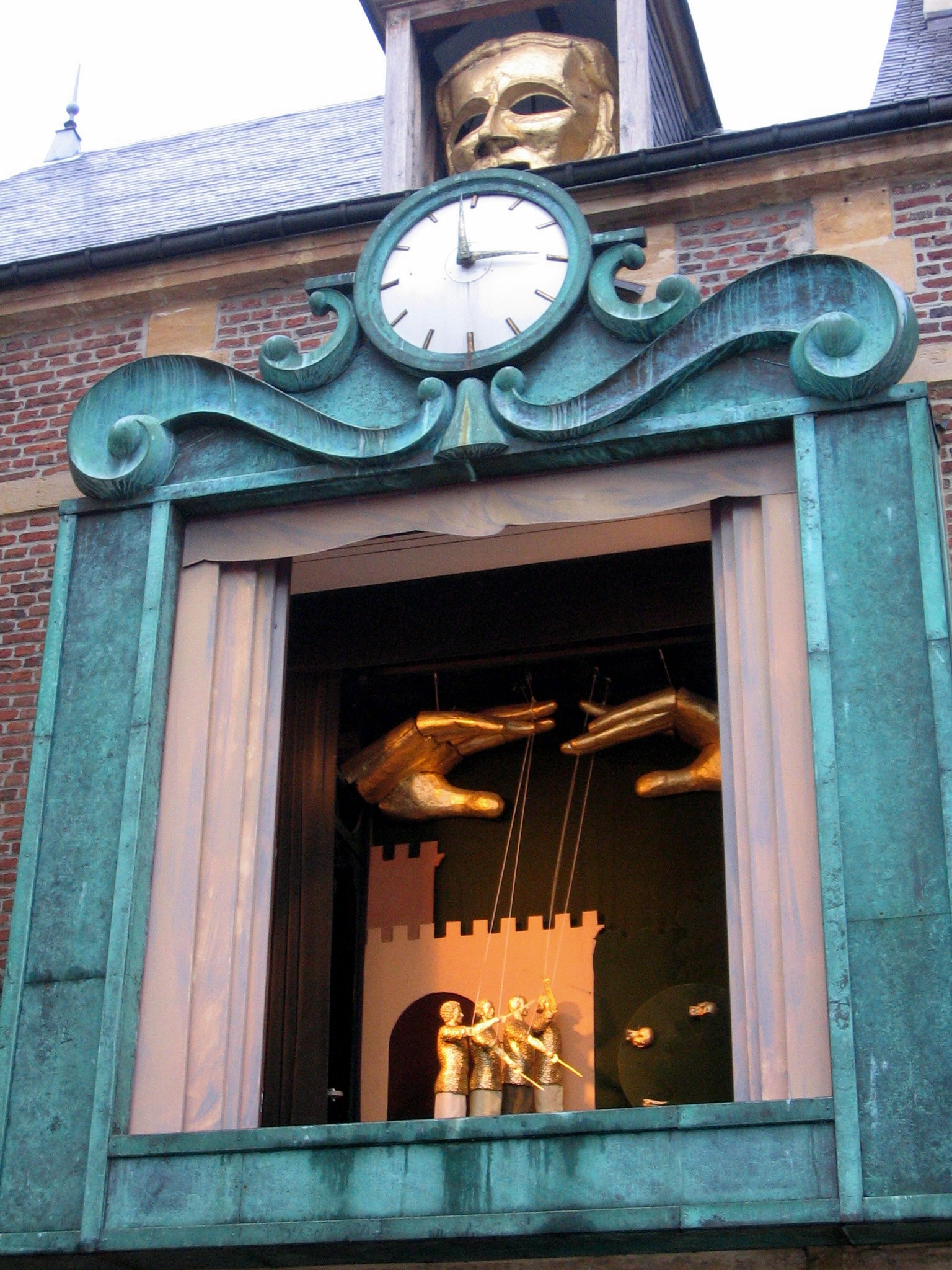 Musée de la marionette Charleville-Mézières